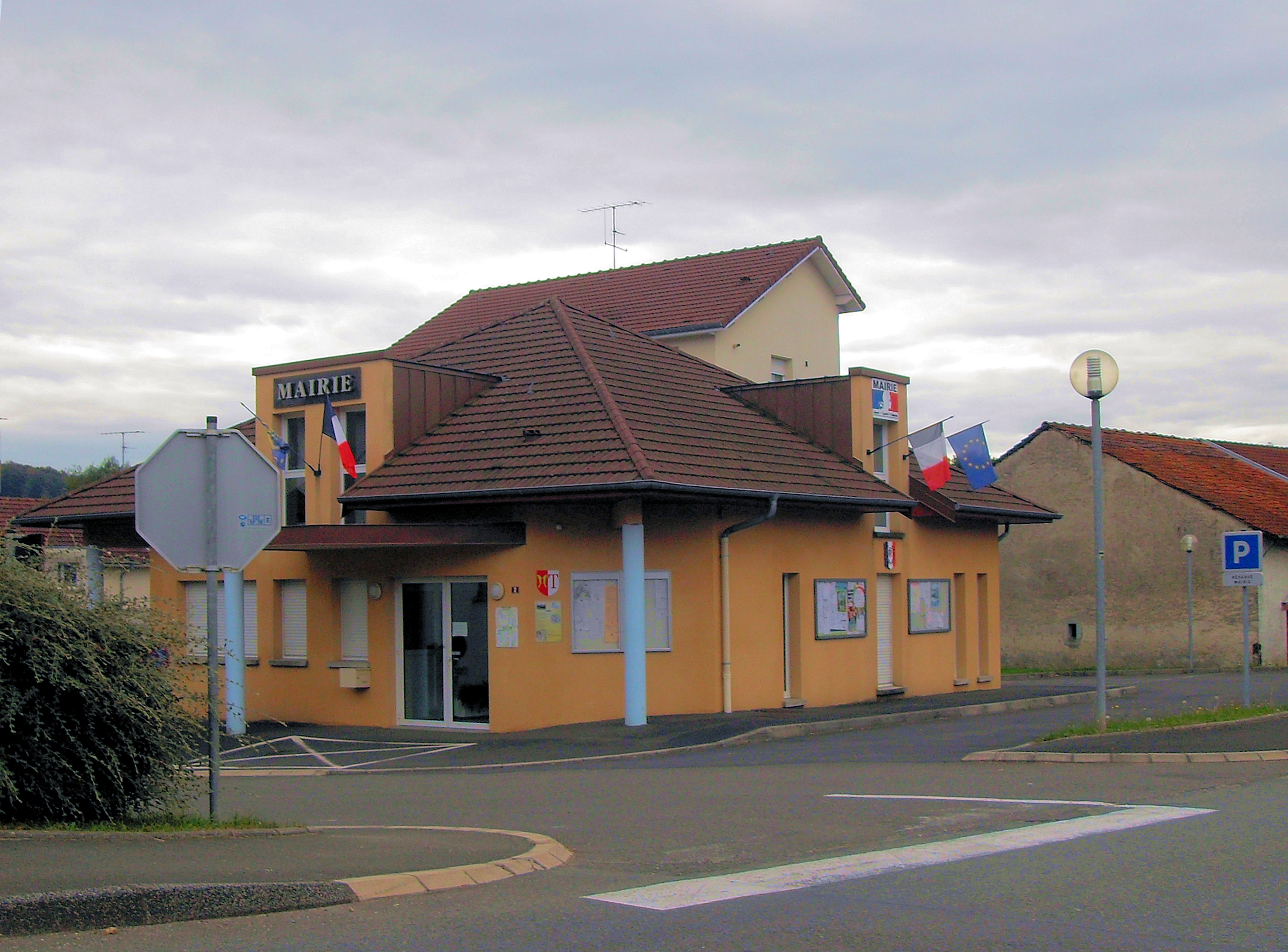 La mairie dAibre